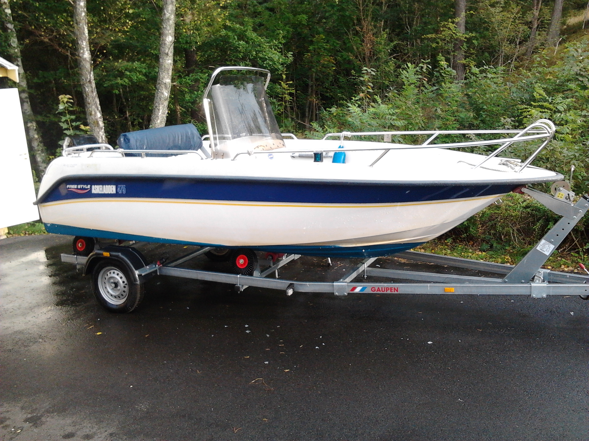 Askeladden 475 Freestyle 2001 modell med 50 hk Merecury